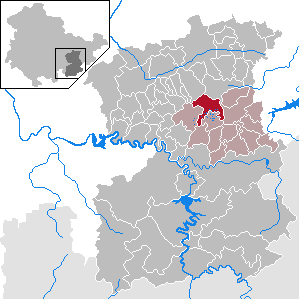 Dreba in Thuringia - Saale-Orla-Kreis